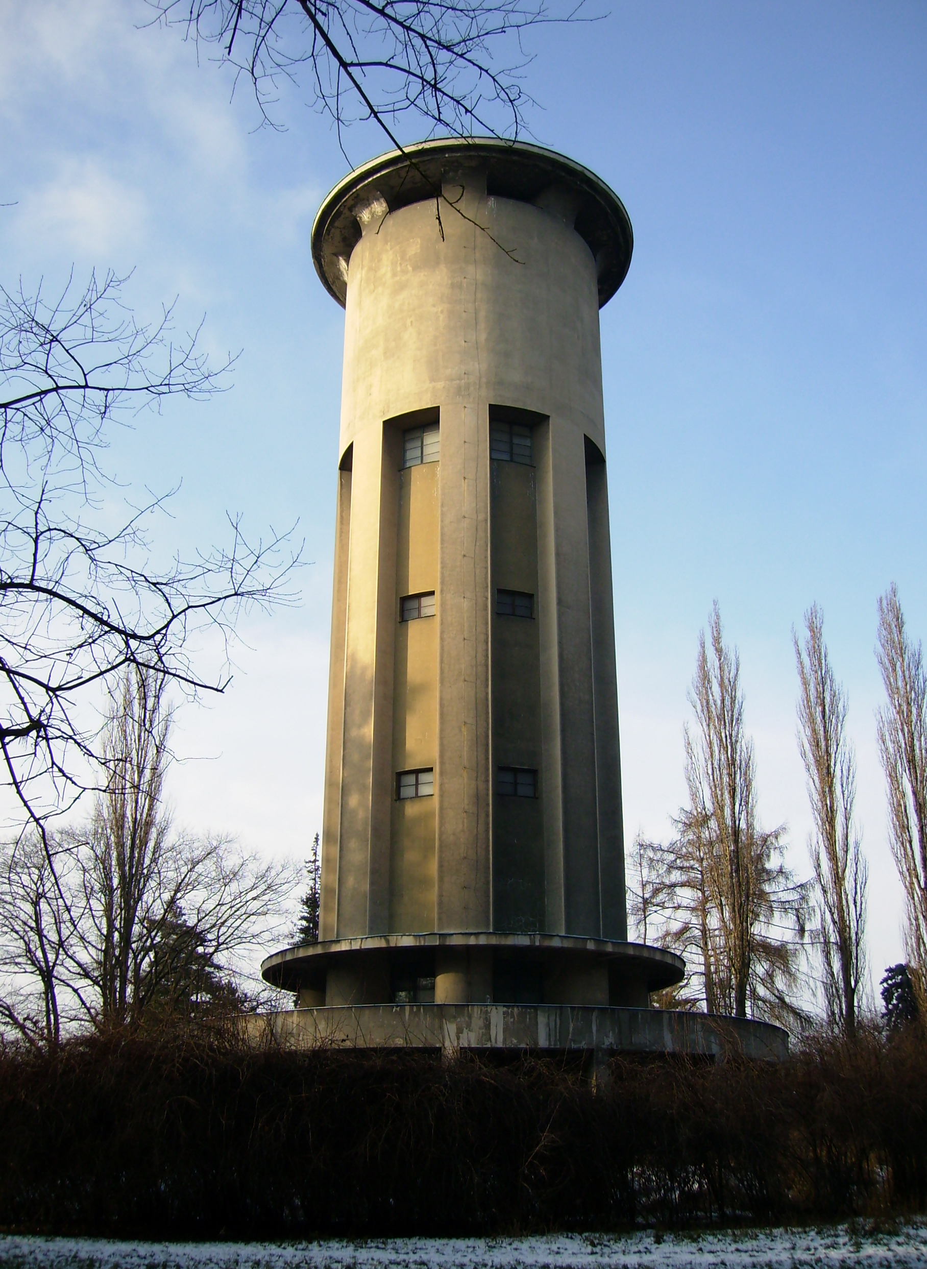 Podebrady - vodarenska vez